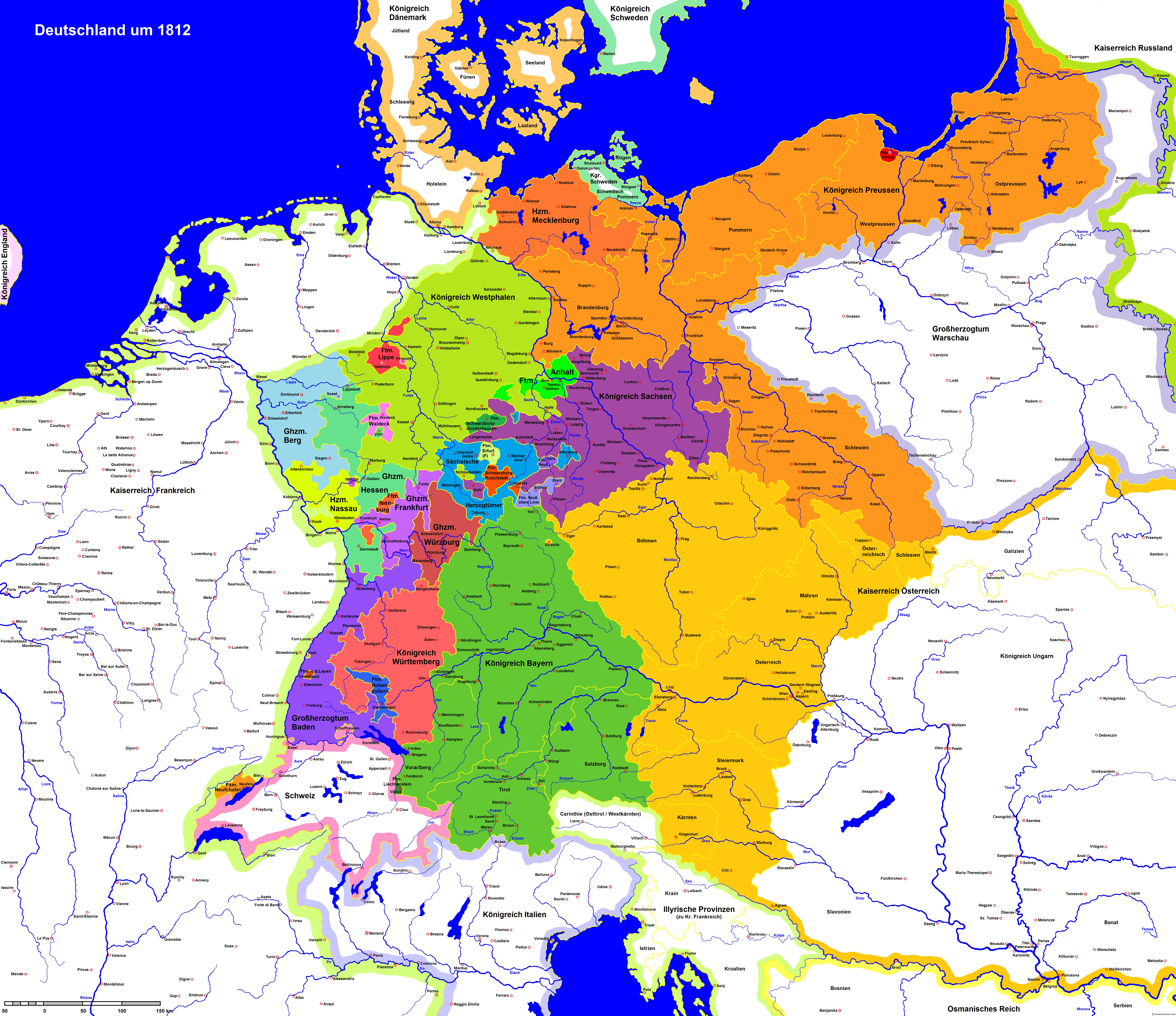 Deutschland 1812 nach dem 5. Koalitionskrieg und vor dem Russlandfeldzug Napoleons